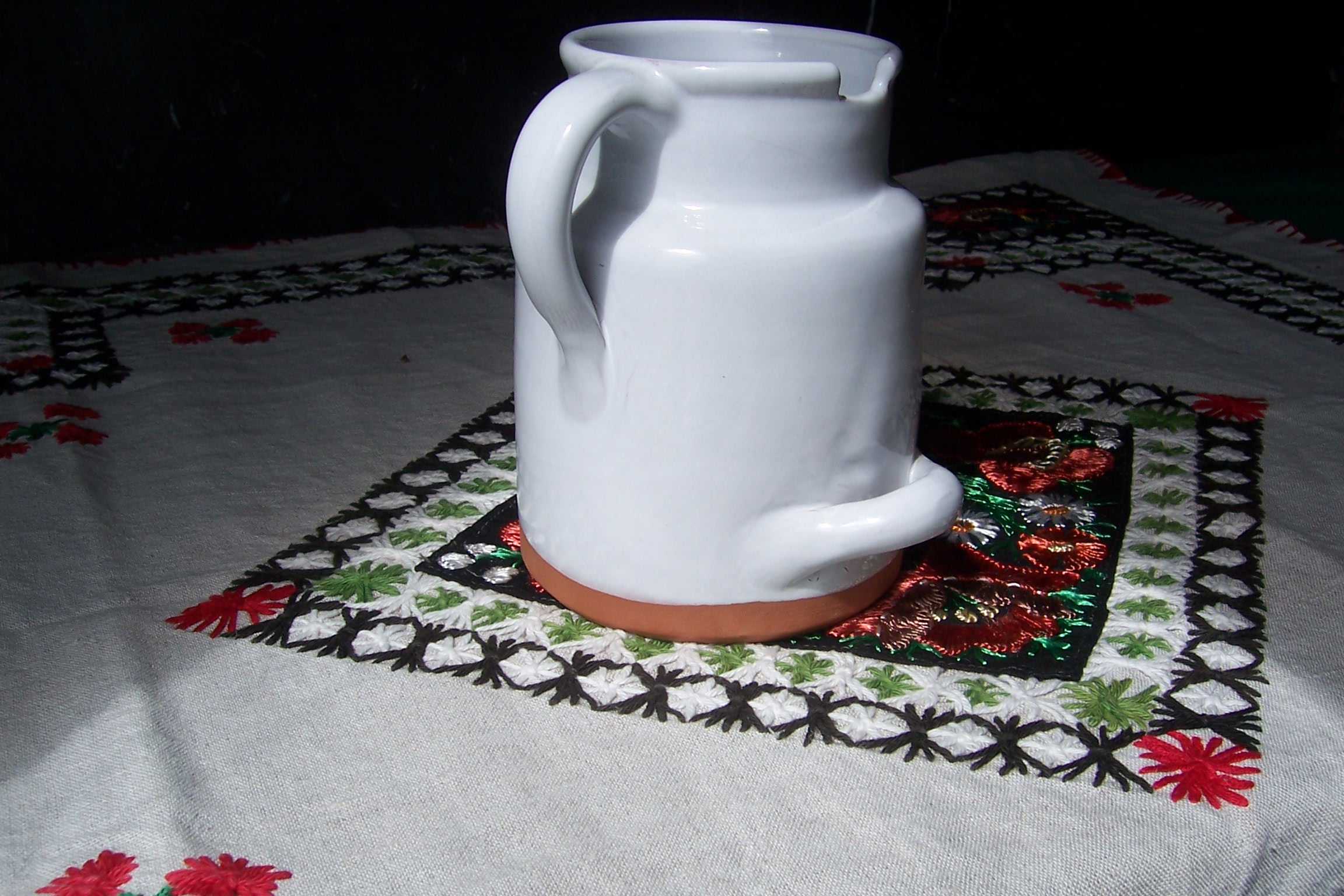 Jarro medidor de leche, tarro de ordeño. Alfarería de Antonio Naharro, localidad: Navarrete, en La Rioja (España). Este tipo de cerámica de vidriado blanco (estannífero), dejando limpio el rodete inferior de la pieza, tuvo su apogéo y quizá su origen en el País Vasco, especialmente en la localidad de Narvaja (Álava) cuyos talleres desaparecieron a mediados del siglo XX. Este tipo de piezas y de vidriado blanco purísimo se han visto también en el alfar de José Ortíz de Zárate (Villarreal de Alava), y en centros más alejados, como Santillana del Mar (Santander).